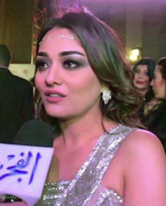 راندا البحيري في حفل استفتاء موقع ومجلة وشوشة، والذى يقام على المسرح الكبير بدار الأوبرا المصرية